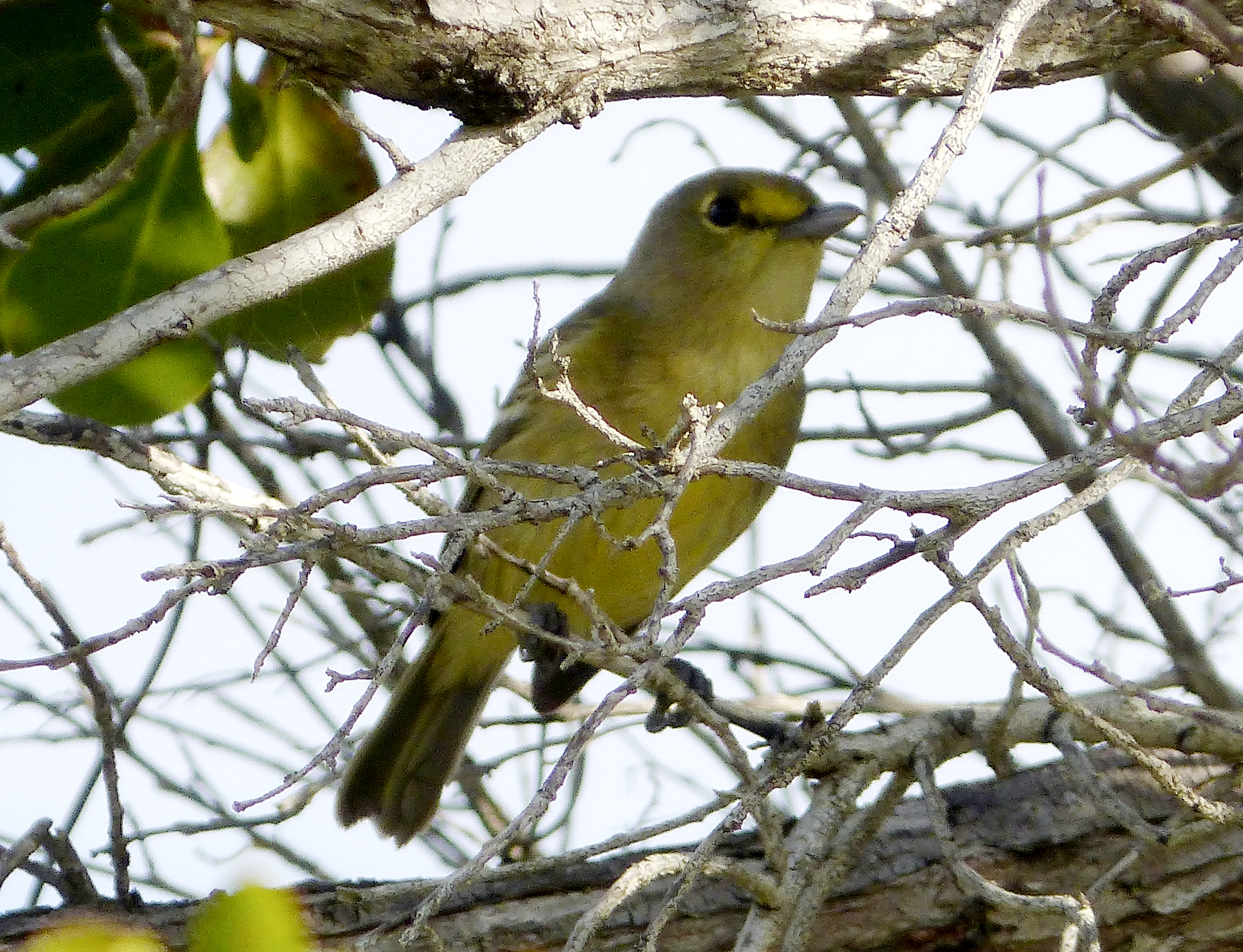 Cayo, Coco Cuba